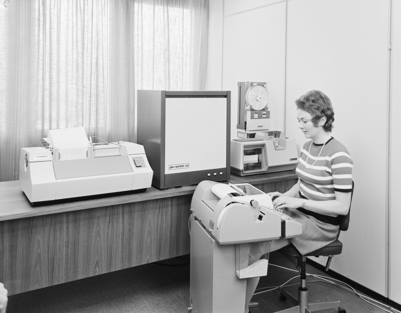 Norsk Data-Elektronikk (later Norsk Data)